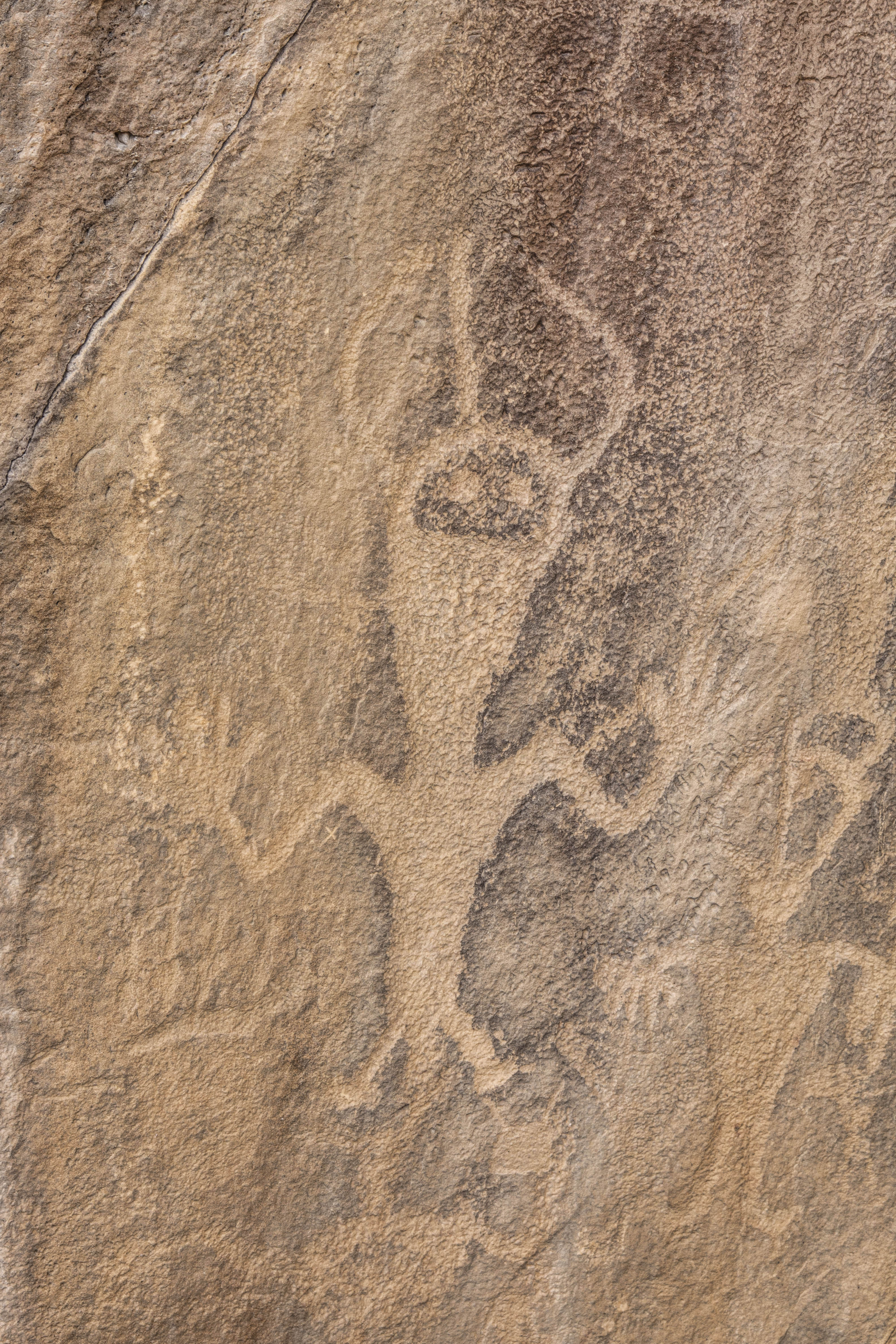 Dinosaur National Monument Rock Art